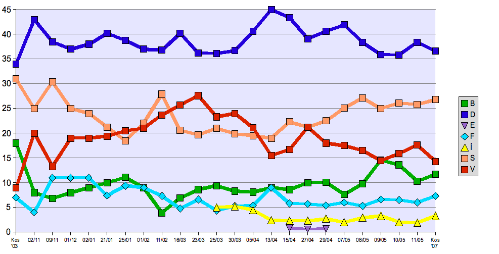 Línuritið sýnir niðurstöður skoðanakannana í aðdraganda alþingiskosninganna 2007. Dagsetningar miðast við birtingardag þeirra. Skoðist með fyrirvara um að aðferðafræðin við framkvæmd kannana er misjöfn eftir þeim sem framkvæma þær, sumar eru gerðar á einum degi en aðrar yfir lengra tímabil, úrtökn eru misstór og svarhlutfall misjafnt (og yfireitt mjög lágt). Ábendingar um kannanir sem vantar inn á grafið sendist á notandaspjall mitt. 2003 - niðurstöður kosninganna í maí 2003 2.11.2006 - Capacent Gallup 9.11.2006 - Fréttablaðið 1.12.2006 - Capacent 2.1.2007 - Capacent 21.1.2007 - Fréttablaðið 25.1.2007 - Heimur.is 1.2.2007 - Capacent 11.2.2007 - Fréttablaðið 16.3.2007 - Capacent 23.3.2007 - Capacent 25.3.2007 - Fréttablaðið 30.3.2007 - Capacent 5.4.2007 - Capacent 13.4.2007 - Blaðið 15.4.2007 - Fréttablaðið 27.4.2007 - Capacent 29.4.2007 - Fréttablaðið 7.5.2007 - Capacent 8.5.2007 - Capacent 9.5.2007 - Capacent 10.5.2007 - Capacent 11.5.2007 - Capacent 2007 - niðurstöður kosninganna í maí 2007